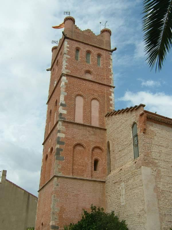 Canet en Roussillon : église paroissiale Saint Jacques (XIVème - XIXème siècles)